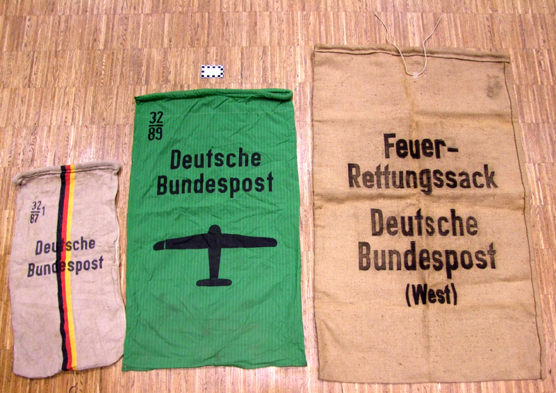 Postbeutel der Deutschen Bundespost. links: normaler braungrauer Postbeutel. mitte: grüner Luftpostbeutel rechts: Feuerrettungssack. Sowie eine Größenvergleichskarte (Vergleiche Original hier)